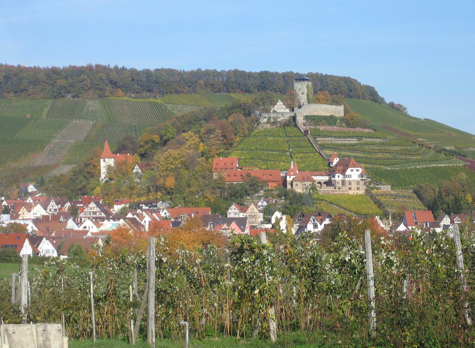 View at Beilstein